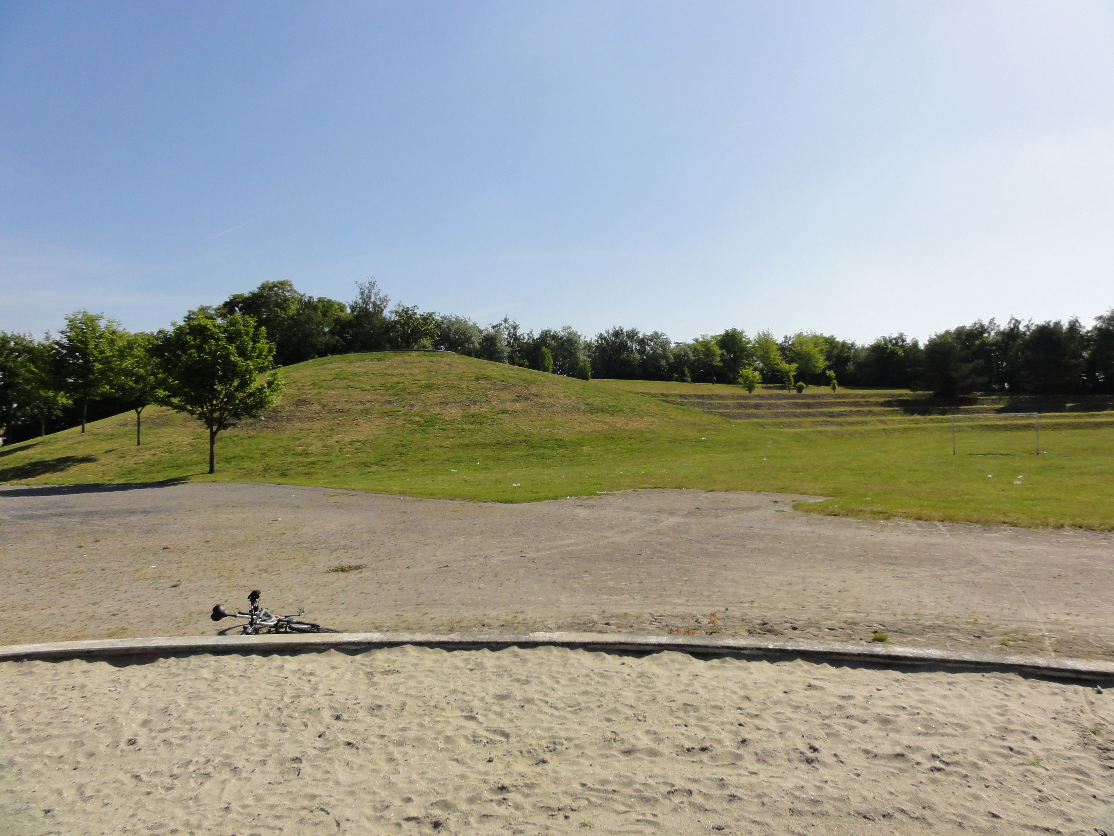 Terril n° 137 dit Bernicourt, Fosse Bernicourt de la Compagnie des mines d'Aniche, Waziers, Nord, Nord-Pas-de-Calais, France.